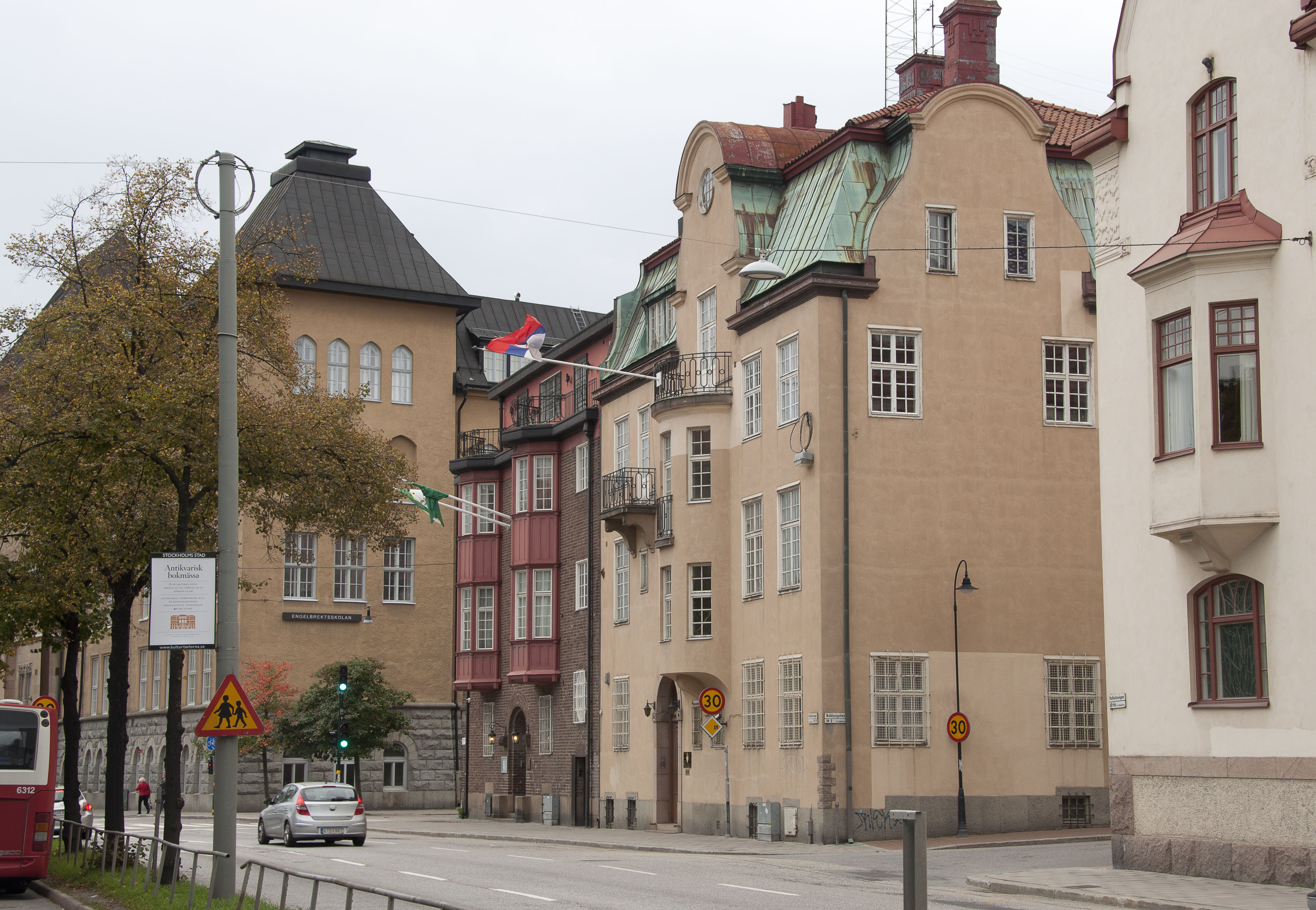 Valhallavägen, Stockholm. Från vänster; Engelbrektsskolan, Valhallavägen 76. Byggnadsår 1899-1902, arkitekt Konrad Elméus. Valhallavägen 72, 74/Uggleviksgatan 15 (Piplärkan 8): Byggnadsår 1909-10, arkitekt Torben Grut, byggherre R Abrahamsson, byggmästare J Telander. Valhallavägen 70/Baldersgatan 14 (Piplärkan 7): Byggnadsår 1910-11, arkitekt och byggherre Erik Josephson, byggmästare P Blom. Ursprungligen arkitektens egen bostad, numera Serbiens ambassad (tidigare Jugoslaviens ambassad). Valhallavägen 68/Baldersgatan 9 (Sånglärkan 6): Byggnadsår 1909-10, arkitekt och byggherre P O Hallman, byggmästare E Lindqvist.